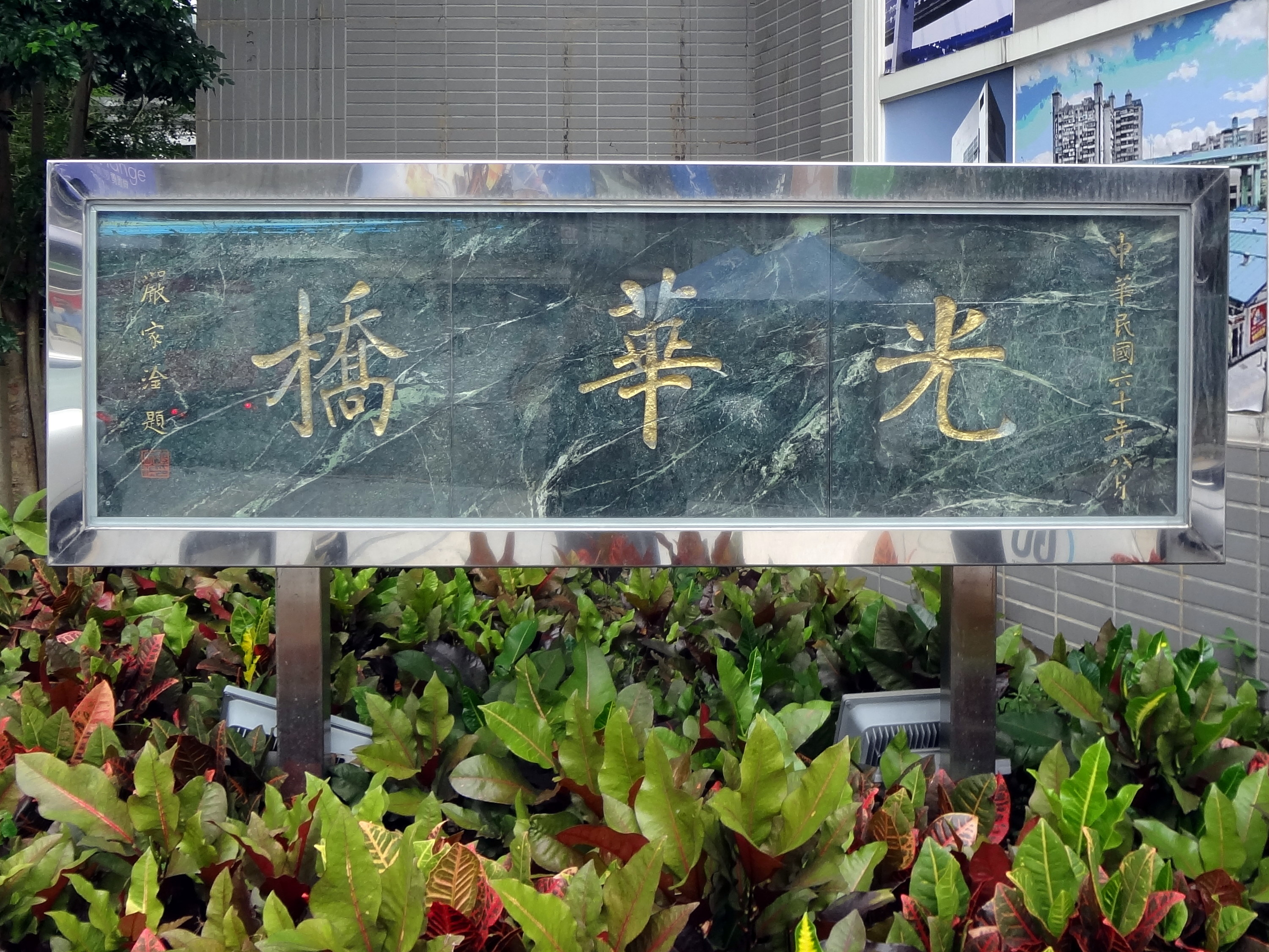 臺北市光華橋被拆除後，嚴家淦題字的光華橋大理石牌被安設於光華數位新天地周邊花圃。